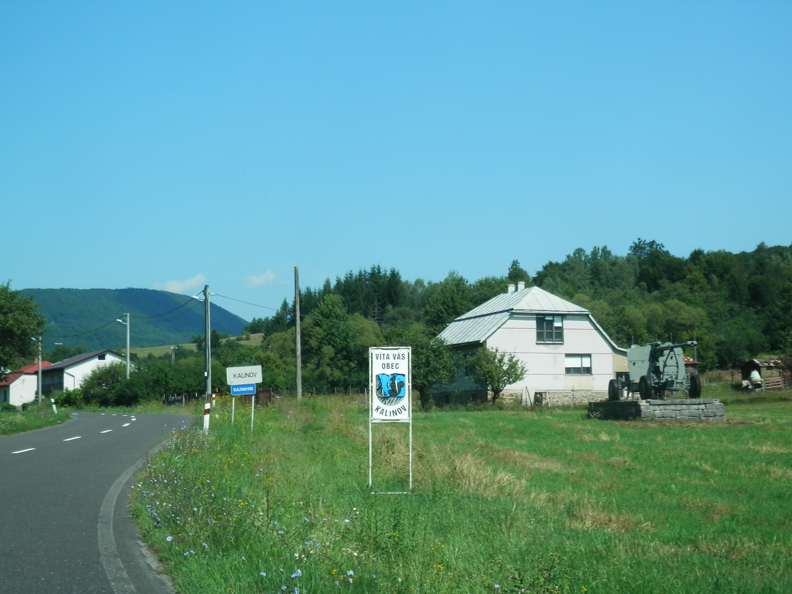 Obec Kalinov sa v archívnych písomnostiach po prvý raz spomína v roku 1595. Známa je aj tým, že bola prvou oslobodenou obcou počas Druhej svetovej vojny v bývalom Československu. Okres Medzilaborce.